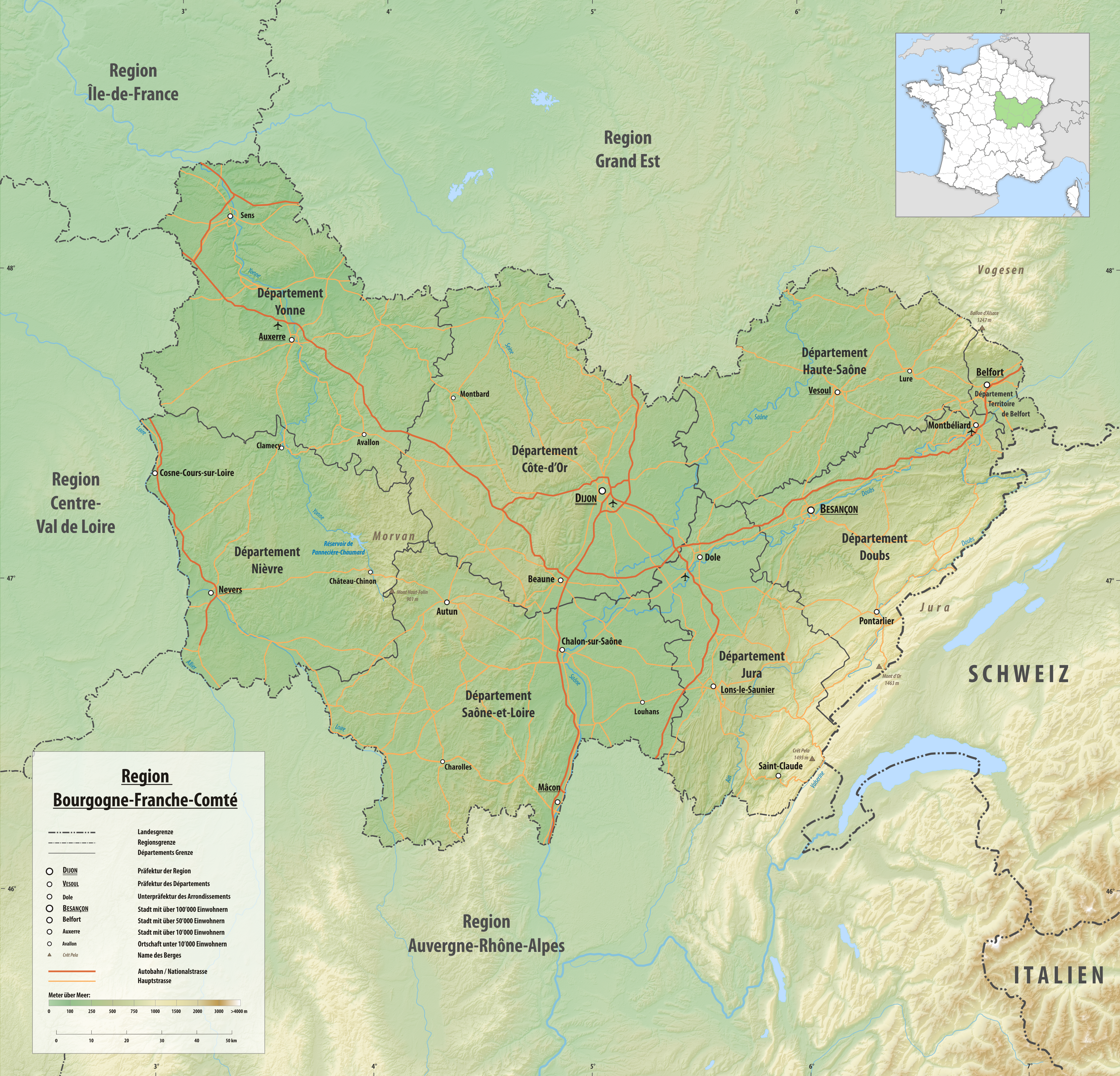 Reliefkarte der Region Bourgogne-Franche-Compte Topographischer Hintergrund: NASA Shuttle Radar Topography Mission (public domain). SRTM3 v.2.